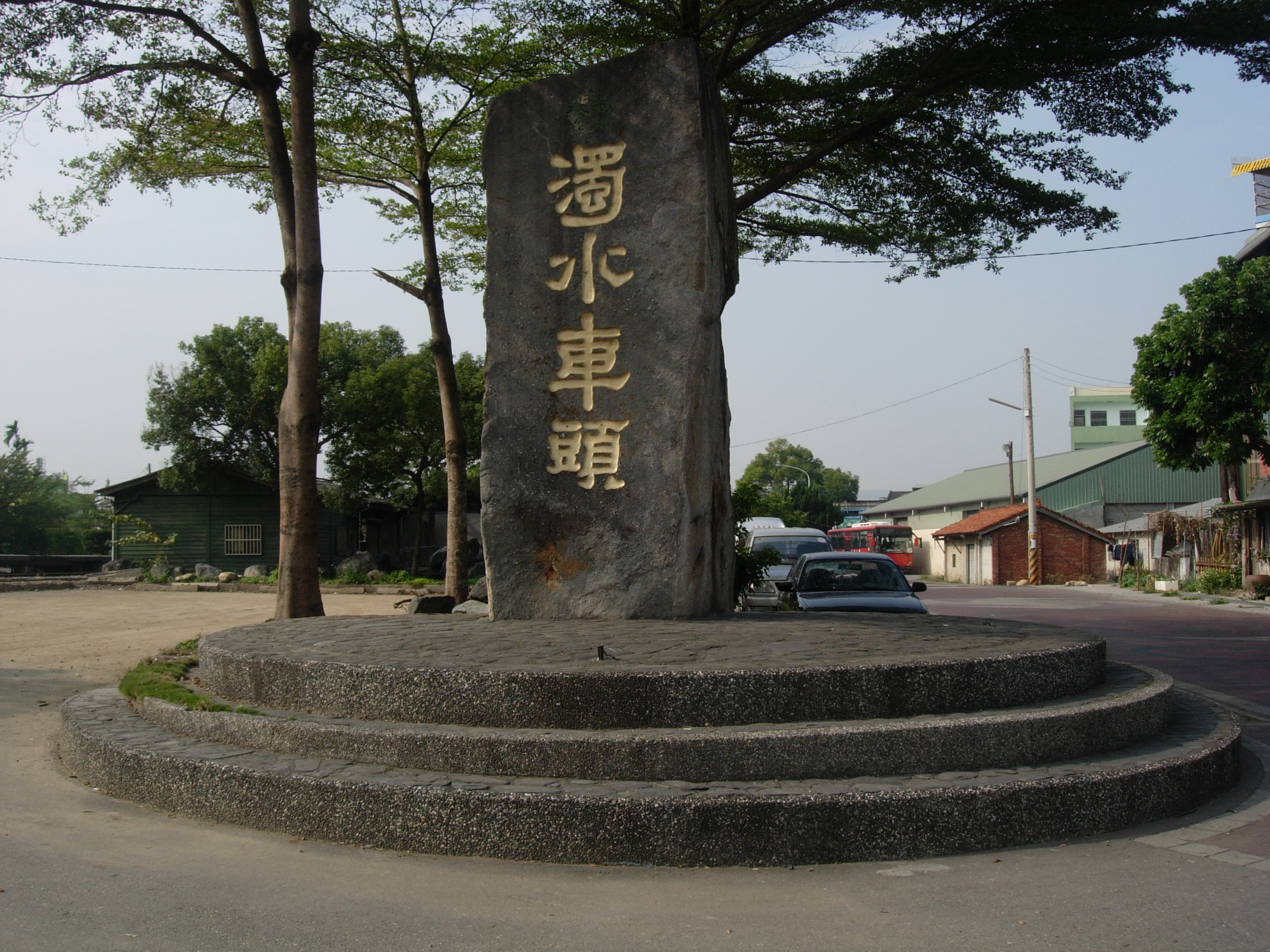 中文（台灣）: 濁水車頭字樣石刻。